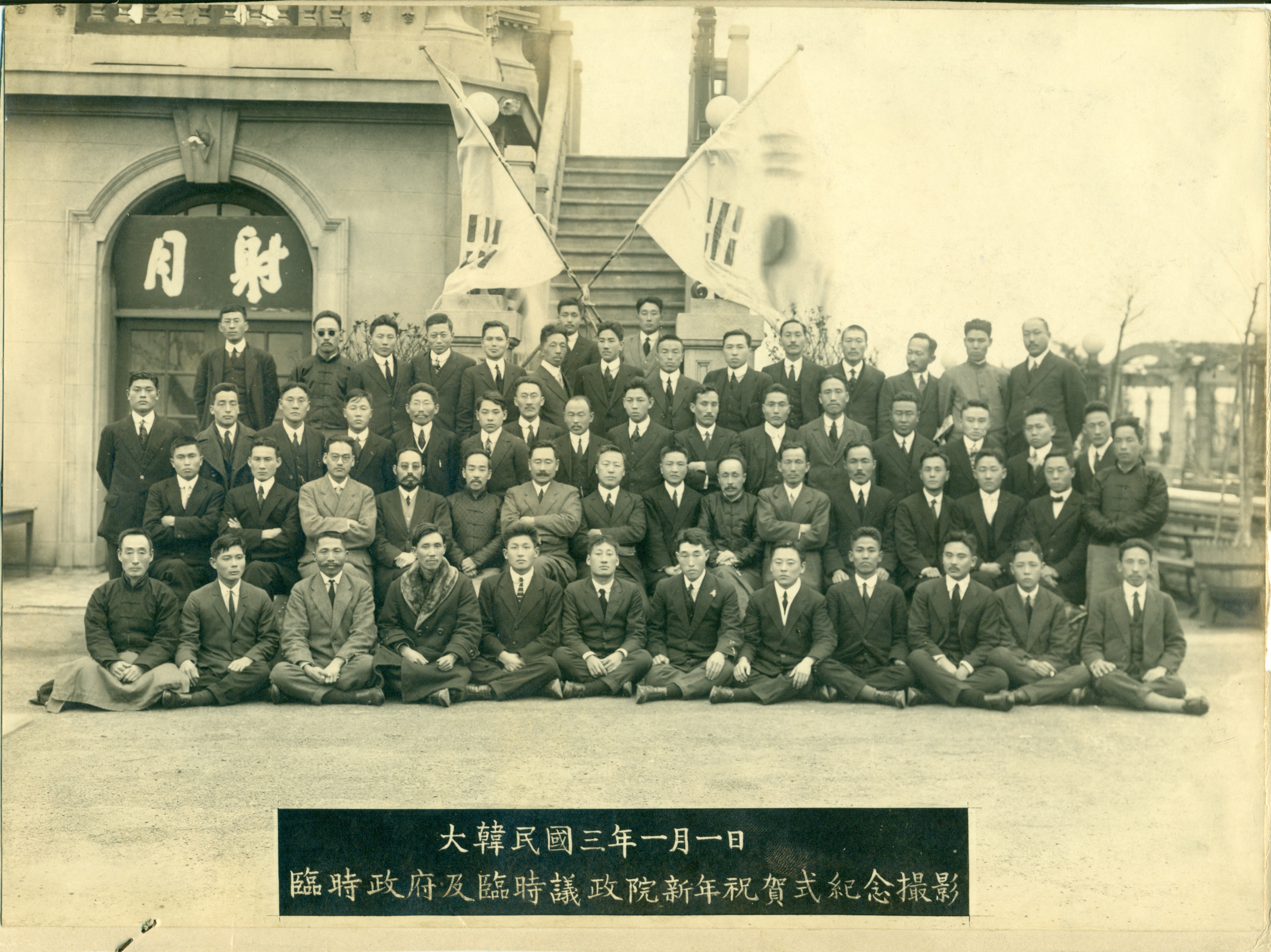 In 1921, the Provisional Government of the Republic of Korea